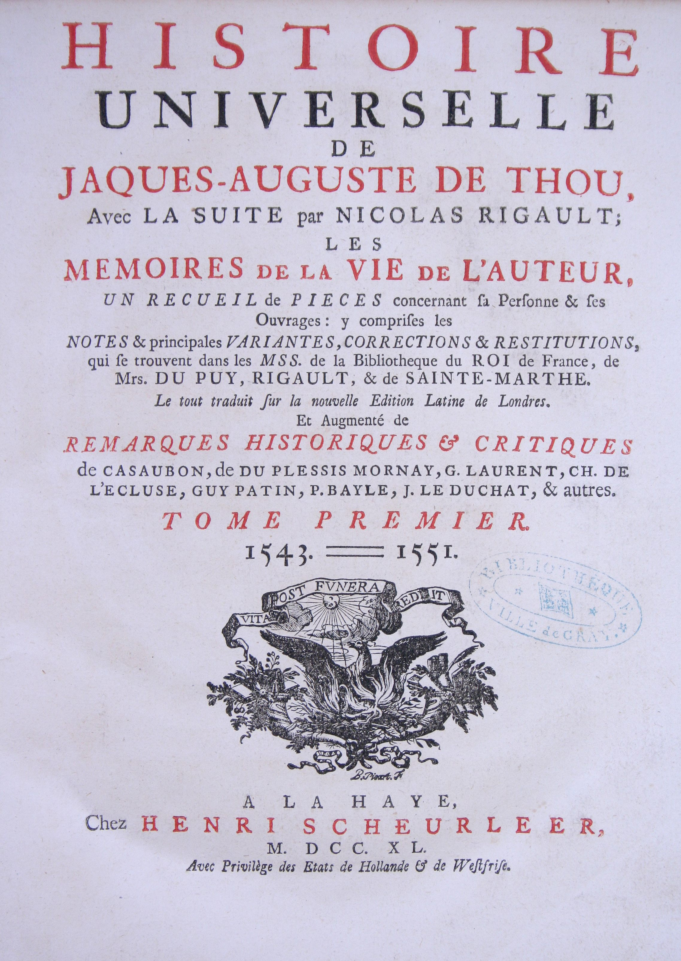 page titre Histoire universelle de Jacques-Auguste de Thou (exemplaire de la bibliothèque patrimoniale de Gray (France))